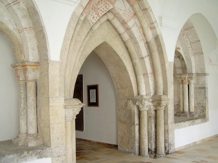 Gotischer Kreuzgang im Stift Wilhering